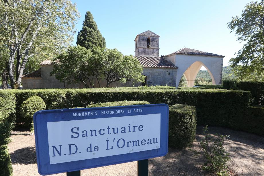 Chapelle de L'Ormeau et son labyrinthite